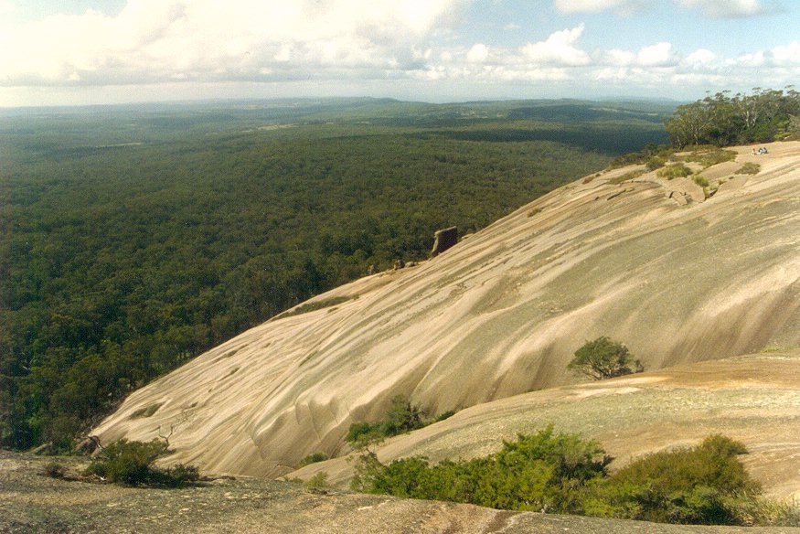 bald Rock, vista from top